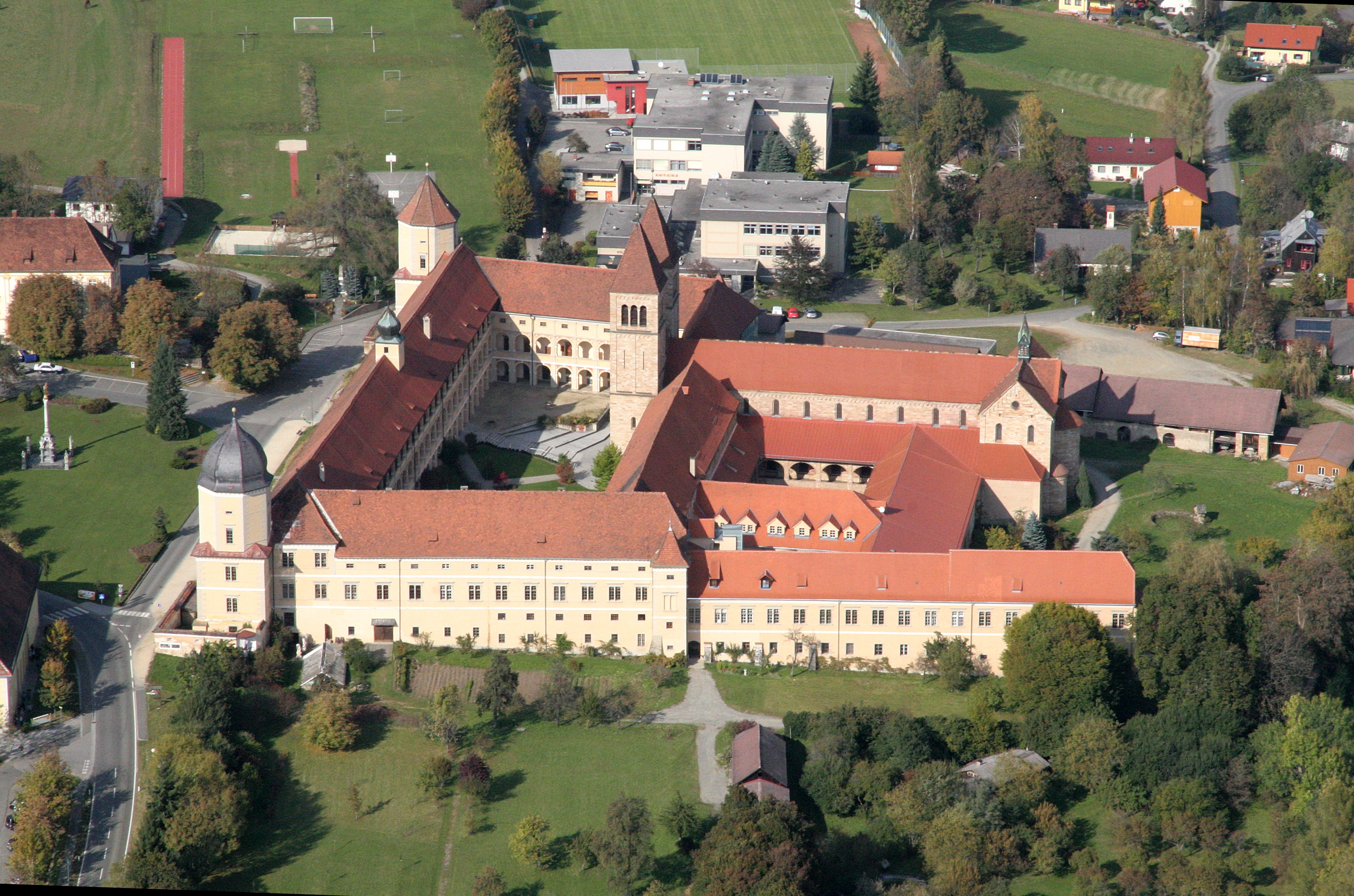 BenediktinerInnenkloster Stift Seckau, Blick vom S/SSO, Haupteingang im W, Kirche geostet, links hinten: Sportplatz